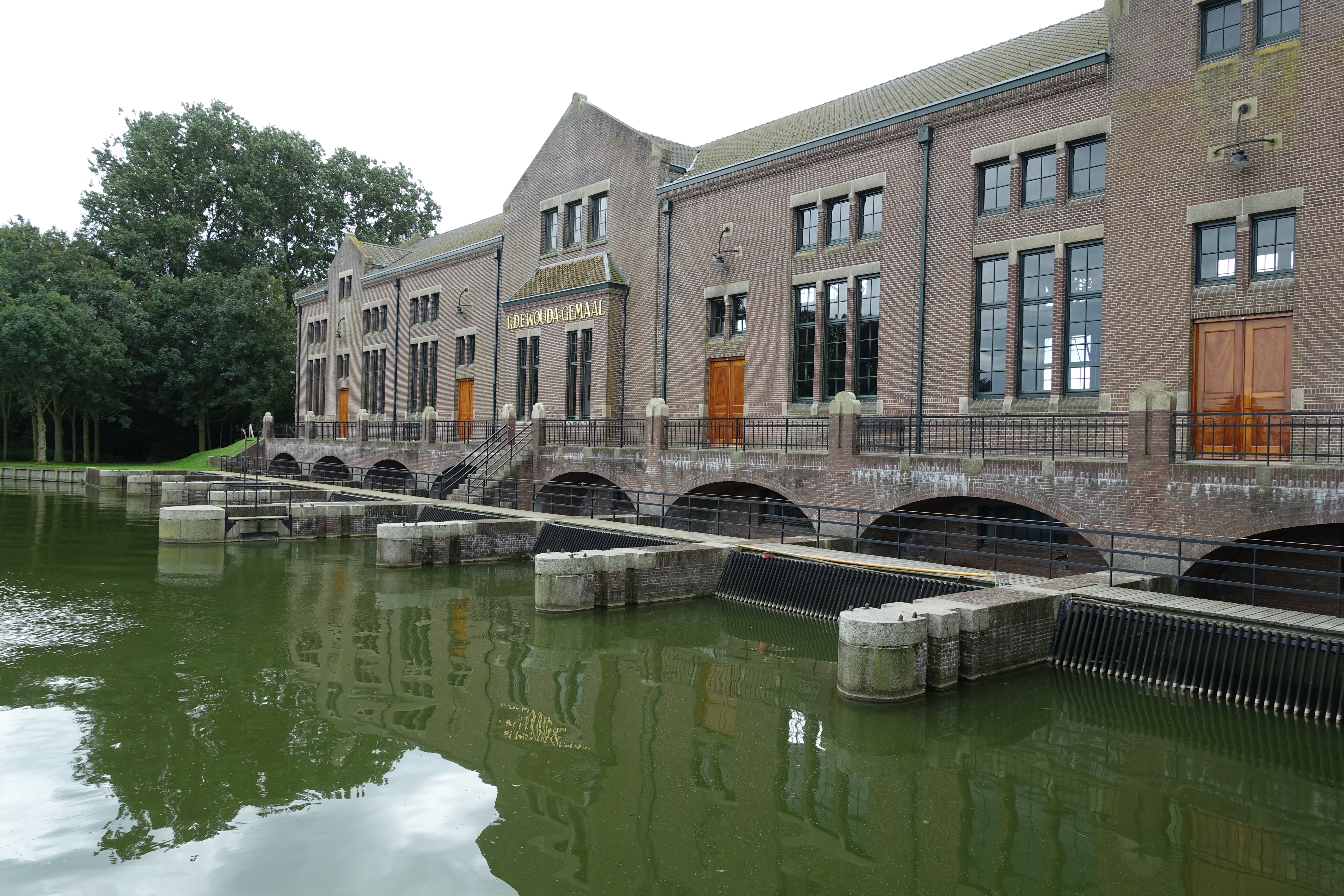 Ir. D.F. Woudegamaal bij Lemmer.